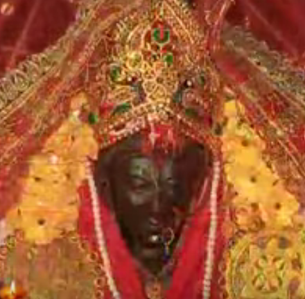 বহুলা দেবী